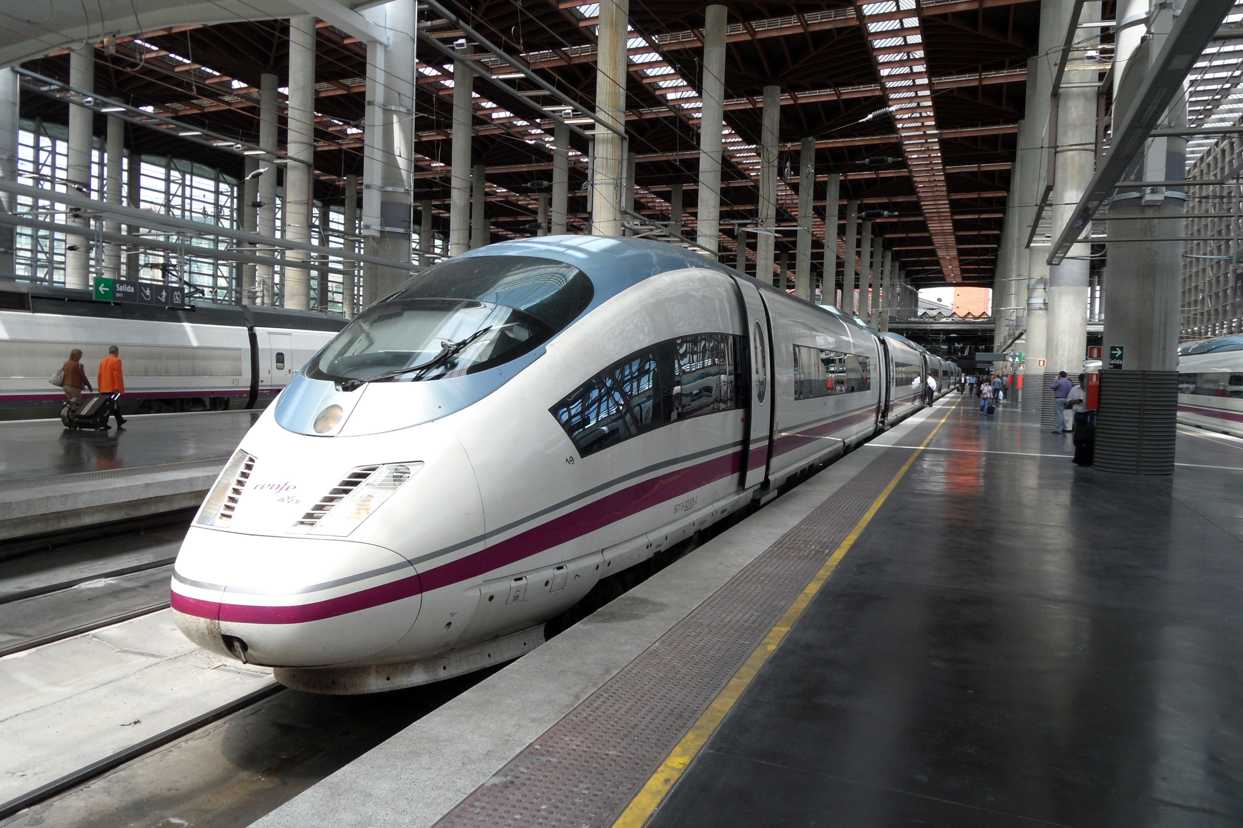 Madrid Atocha–Barcelona Sants, die Stammstrecke dieser Einheiten.Die Aufmerksamkeit des Sicherheitspersonals ist dem Fotografen an dieser Stelle sicher.